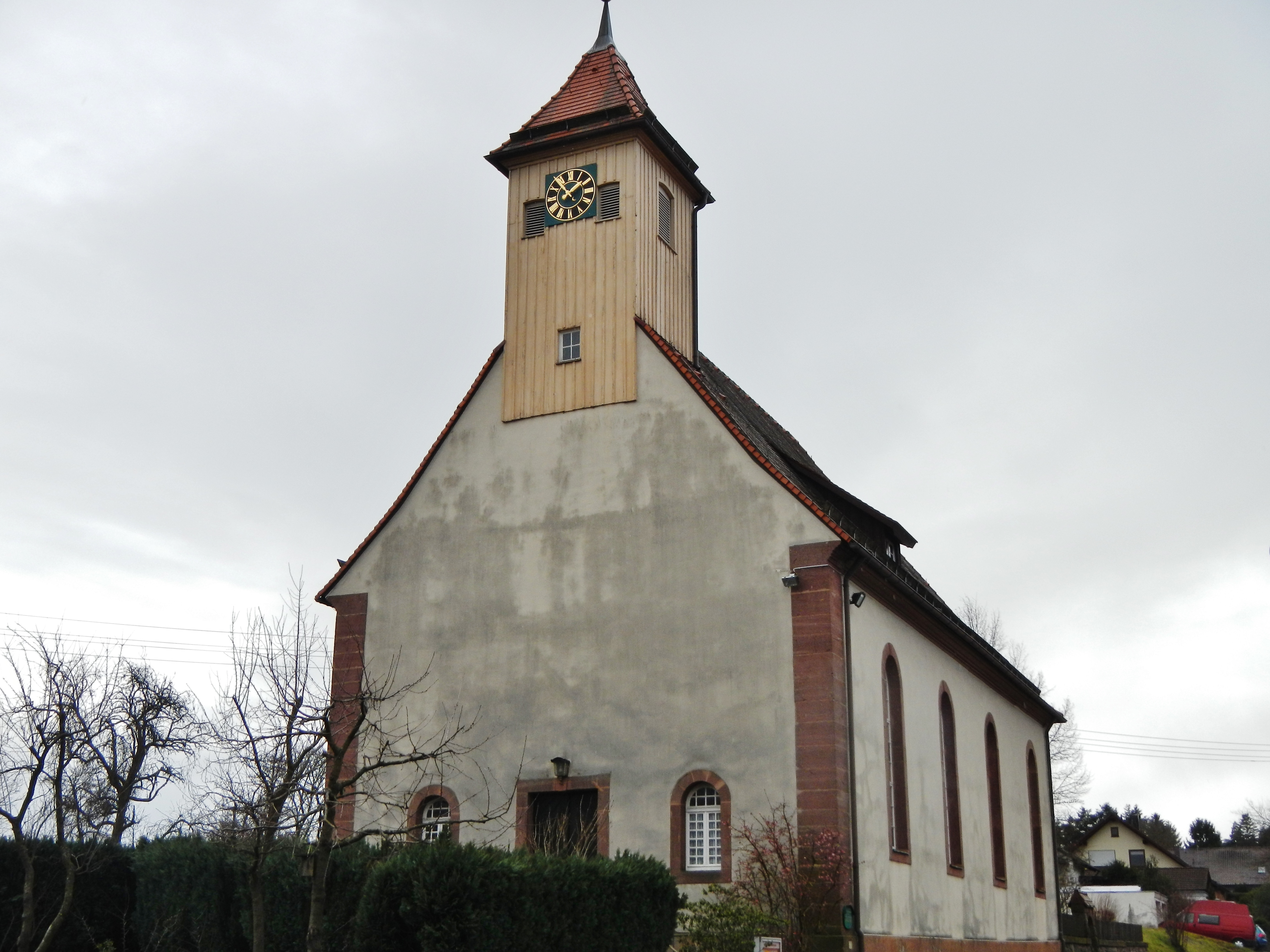 Evangeliche Kirche in Monakam